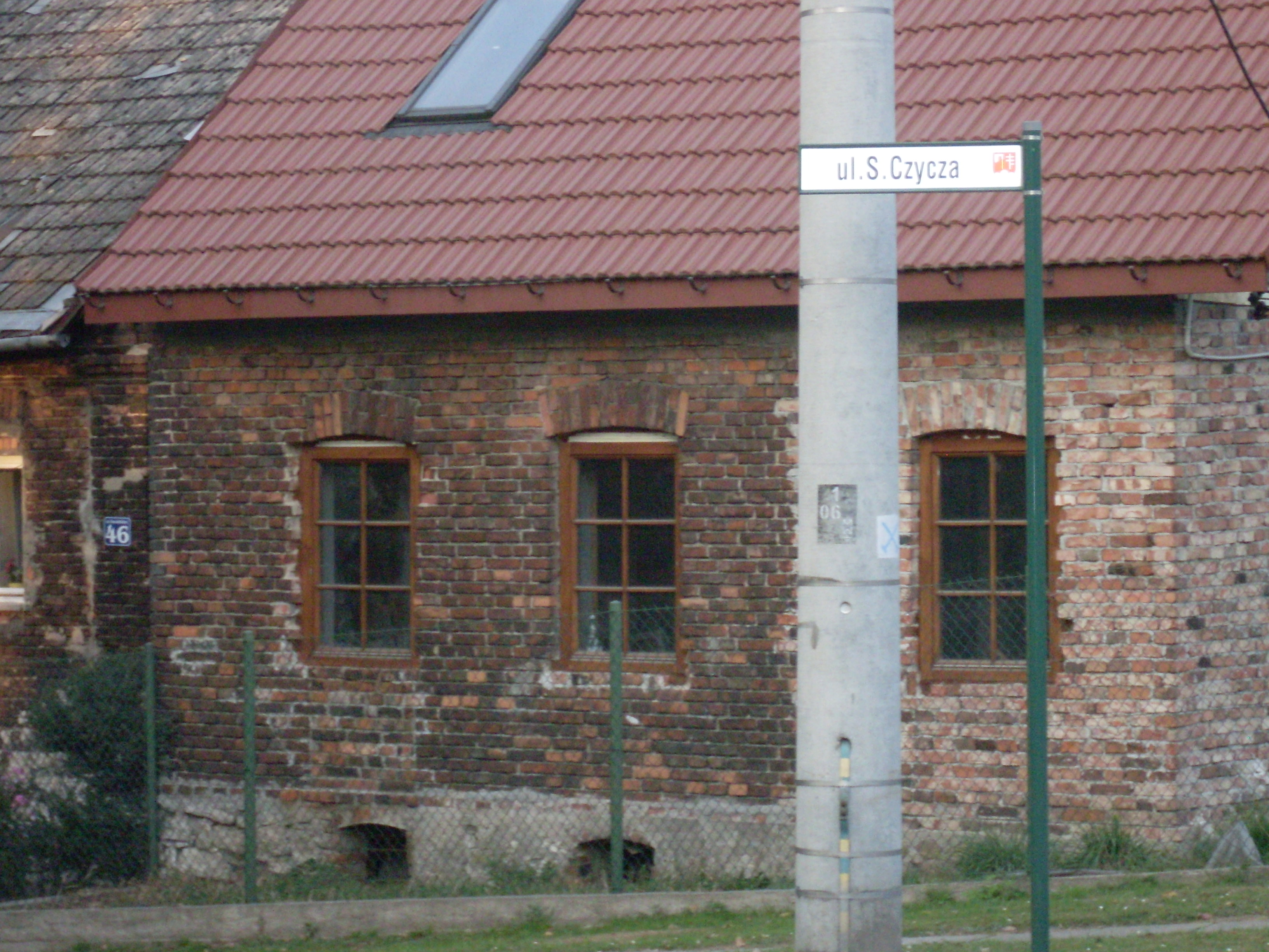 Dom rodzinny Stanisława Czycza.Nawojowa Gwoździec.Ulica S.Czycza w Krzeszowicach Gwoźdźcu (granica miejscowości)